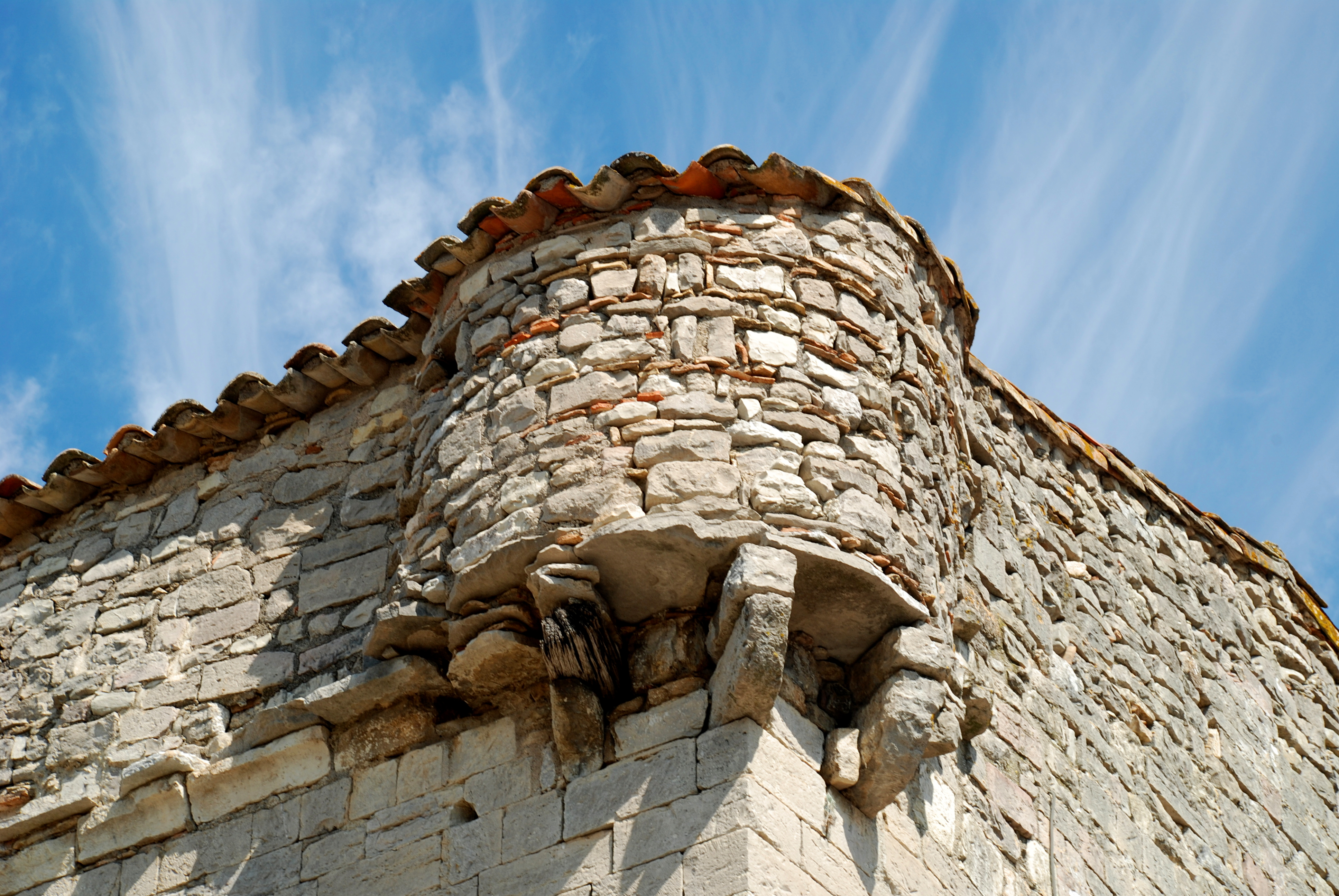 France - Languedoc - Église de Sainte-Croix-de-Quintillargues